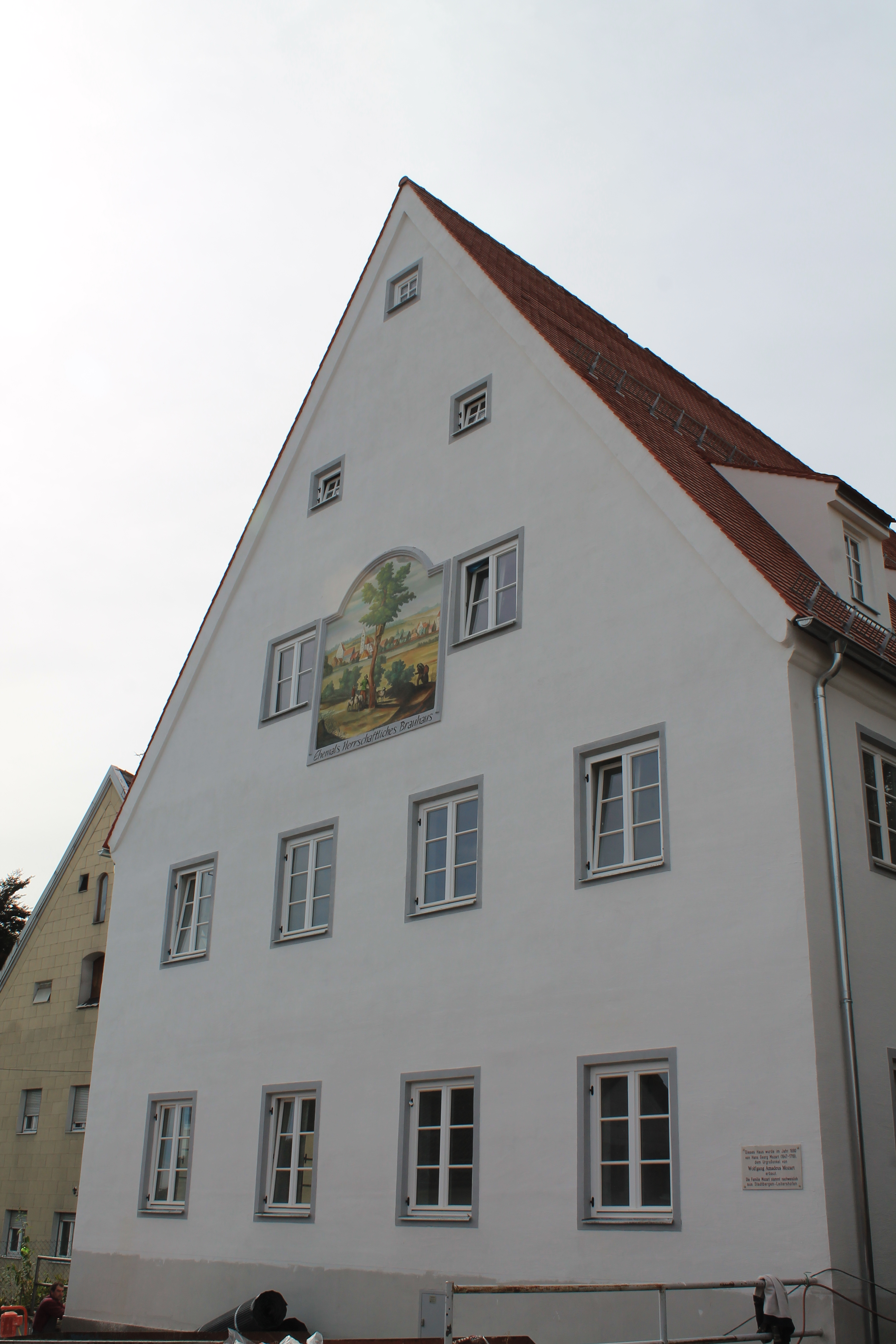 Gasthof Bräuhaus, langgestreckter giebelständiger Satteldachbau, um 1690 von Hans Georg MozartThis is a photograph of an architectural monument.